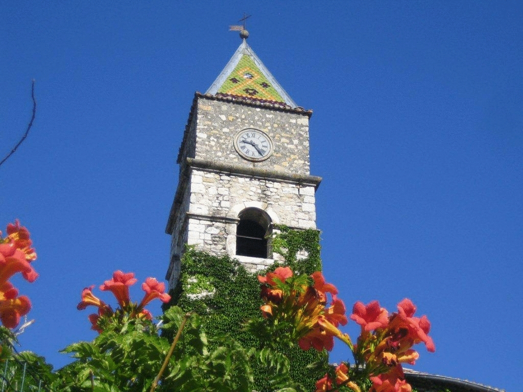 Eglise romane de Valvignères